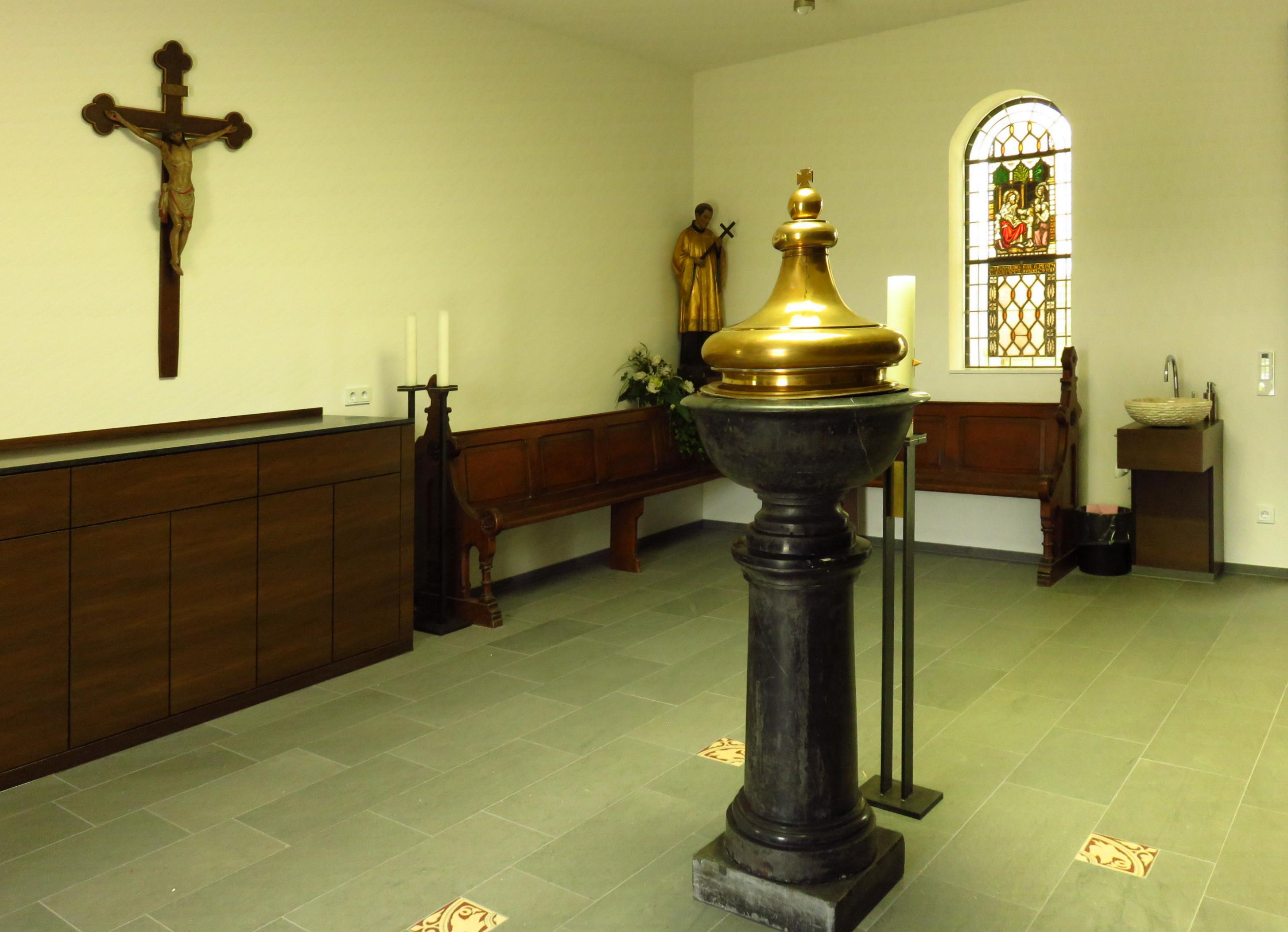 Bild aus der Kapelle St. Lambertus in Immerath (neu)